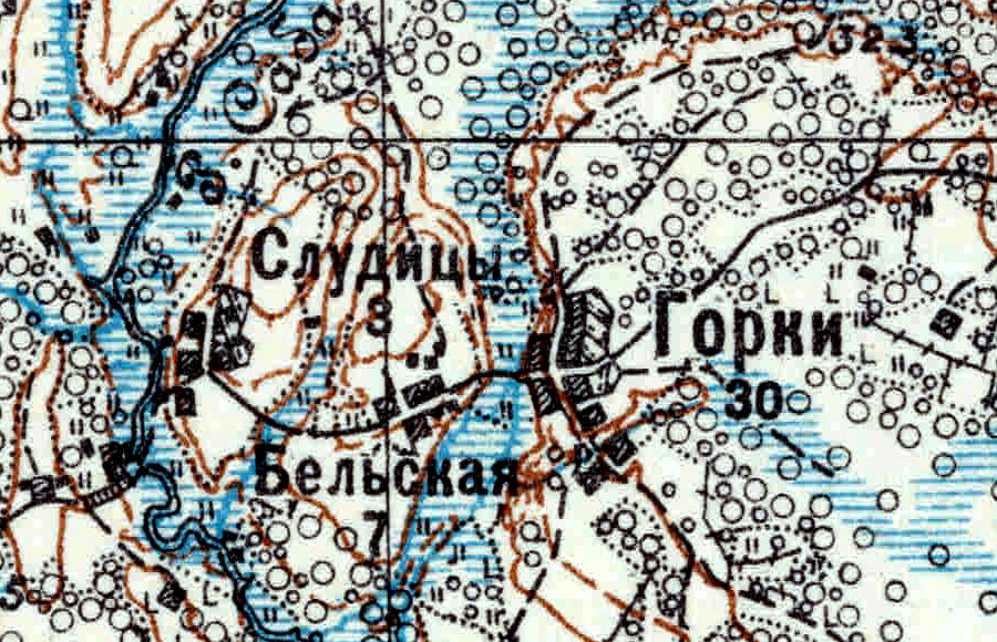 Топографическая карта Ленинградской области, квадрат VIc-27 (Залустижье), деревни Слудицы, Горки, Бельская